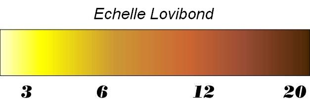 Le degré Lovibond est utilisé pour mesurer la couleur de la bière.